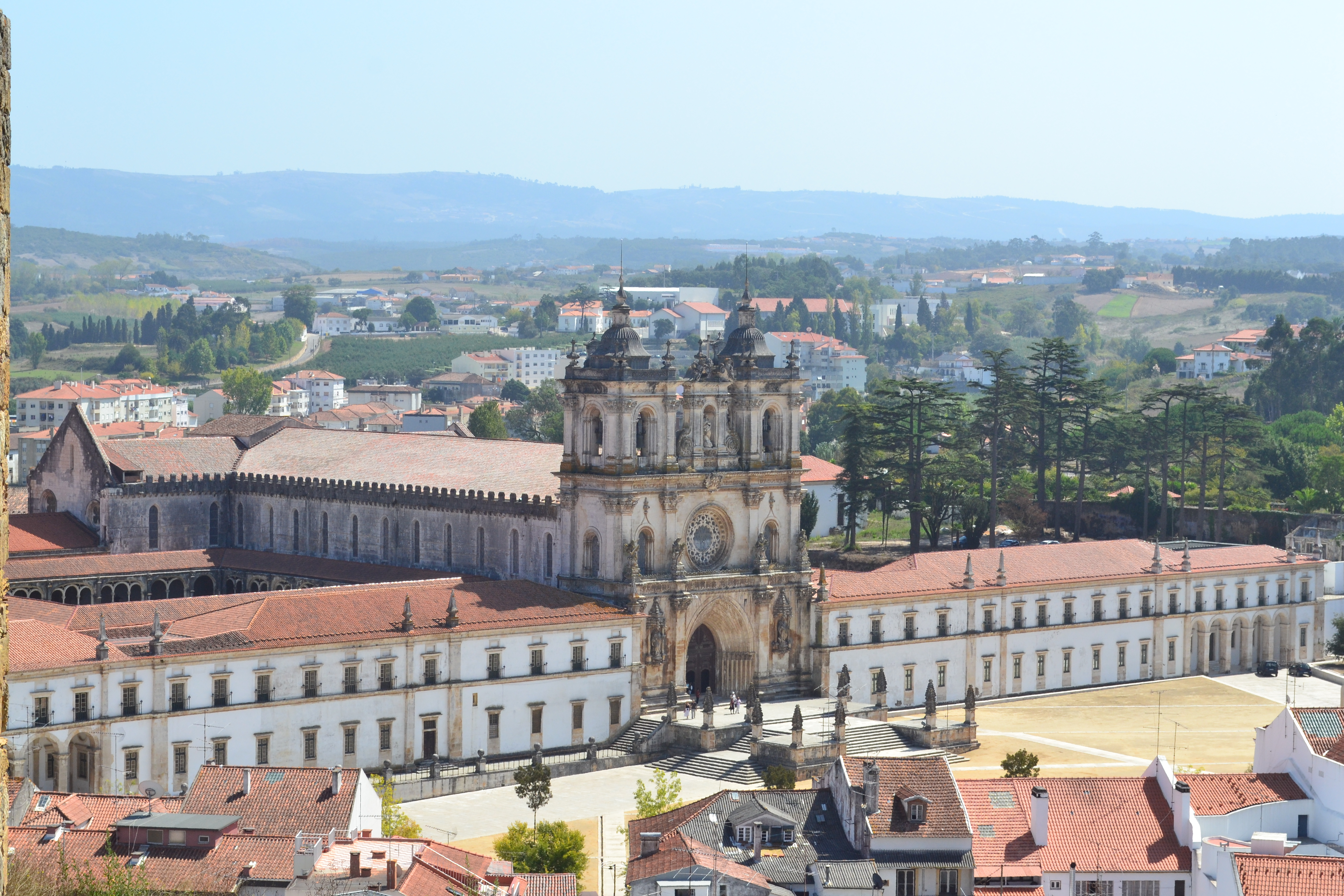 O Mosteiro de Alcobaça visto a partir das ruínas do castelo de Alcobaça This file was uploaded for Wiki Loves Monuments in Portugal with the unique identifier 70185.